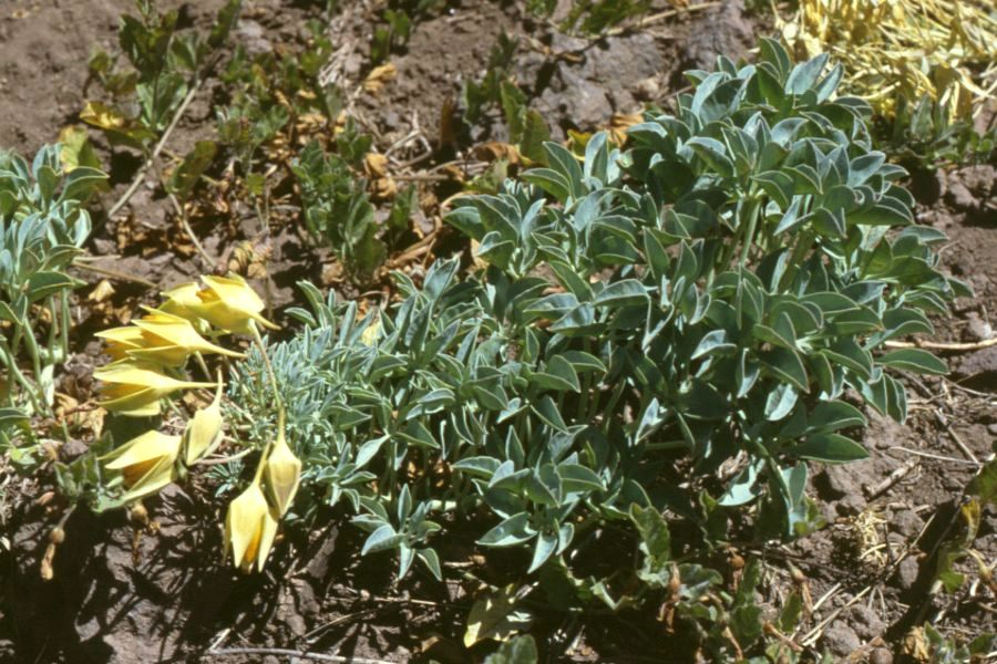 Tropaeolum polyphyllum Cav., Kapuzinerkressengewächse (Tropaeolaceae), vor dem Aufblühen/antes de florecer/before bloom - Argentinien/Argentina, Paso de Uspallata, W Puente del Inca, ca. 2800 m s.m. (Prov. Mendoza)